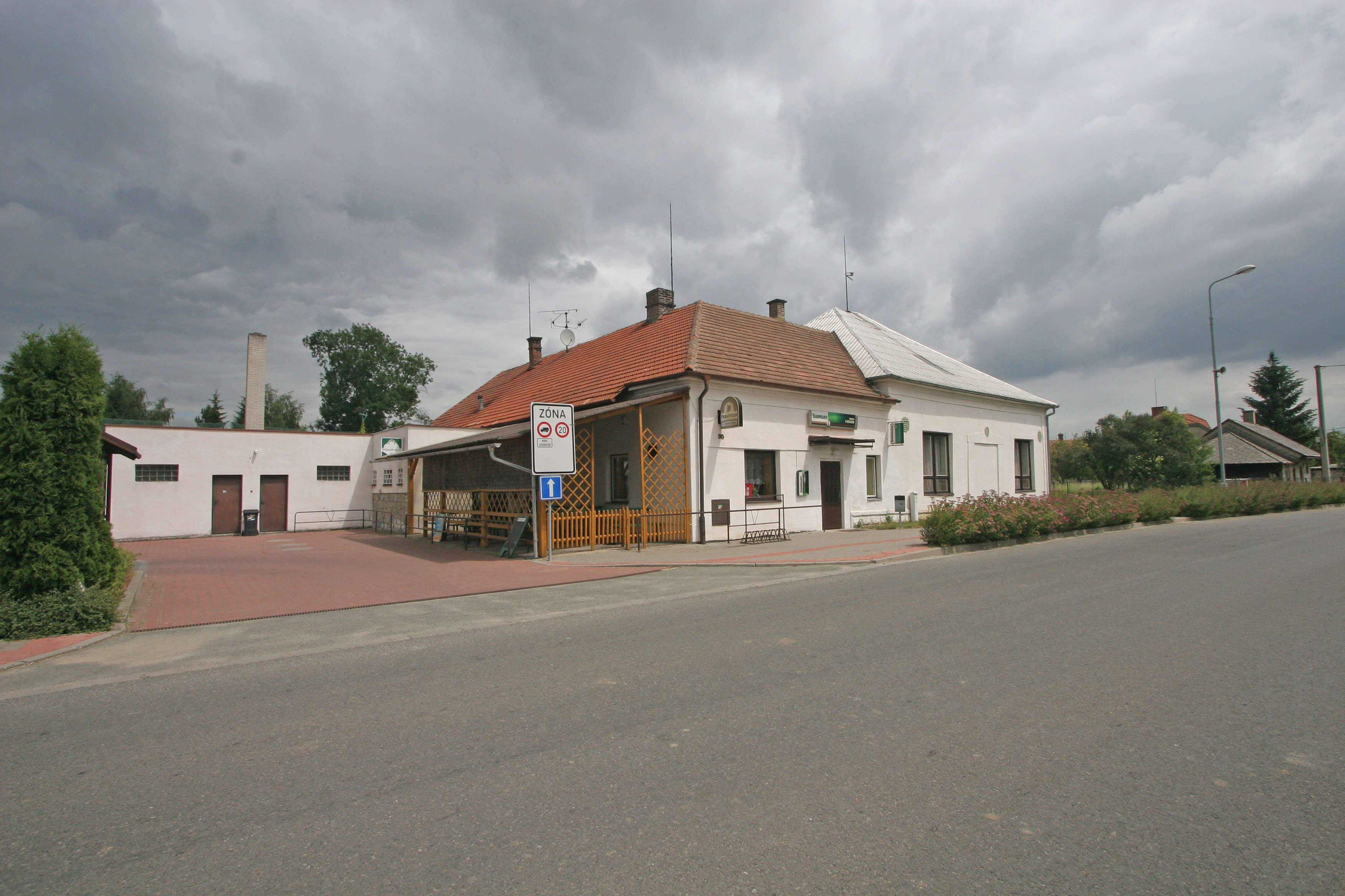 Dolní Ředice hospoda